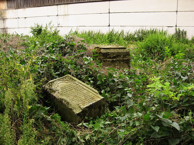 Брашэвічы. Надмагіллі каля былой уніяцкай царквы